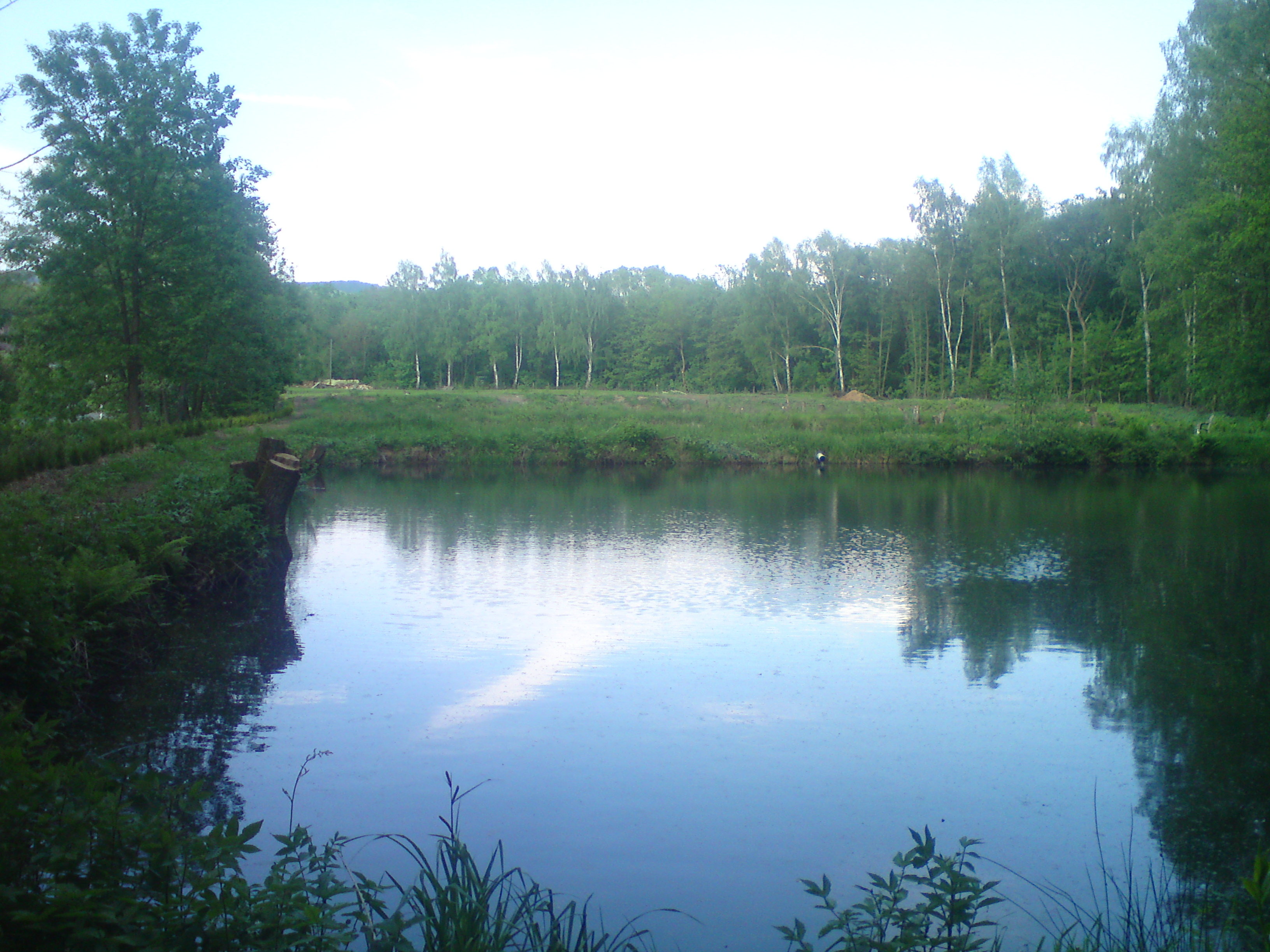 Fischteich bei Aschehütte, links die kleine Steinau; gelegen im LSG „Harz (Landkreis Osterode am Harz, seit 2016 LK Göttingen)“